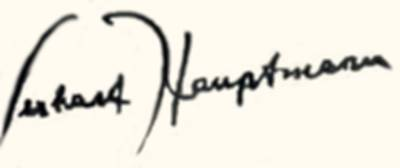 Unterschrift des deutschen Schriftstellers Gerhart Hauptmann